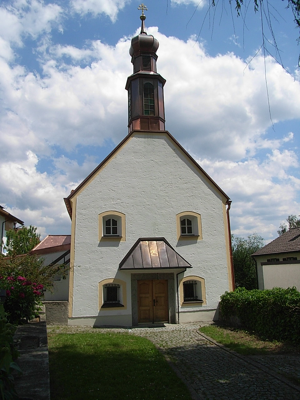 Kapelle Rabenstein